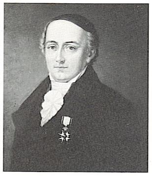 Photograph of old painting. Föreställer Carl Georg Stiernswärd (1767-1825).